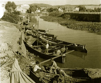 Arroio Dilúvio em Porto Alegre antes da canalização